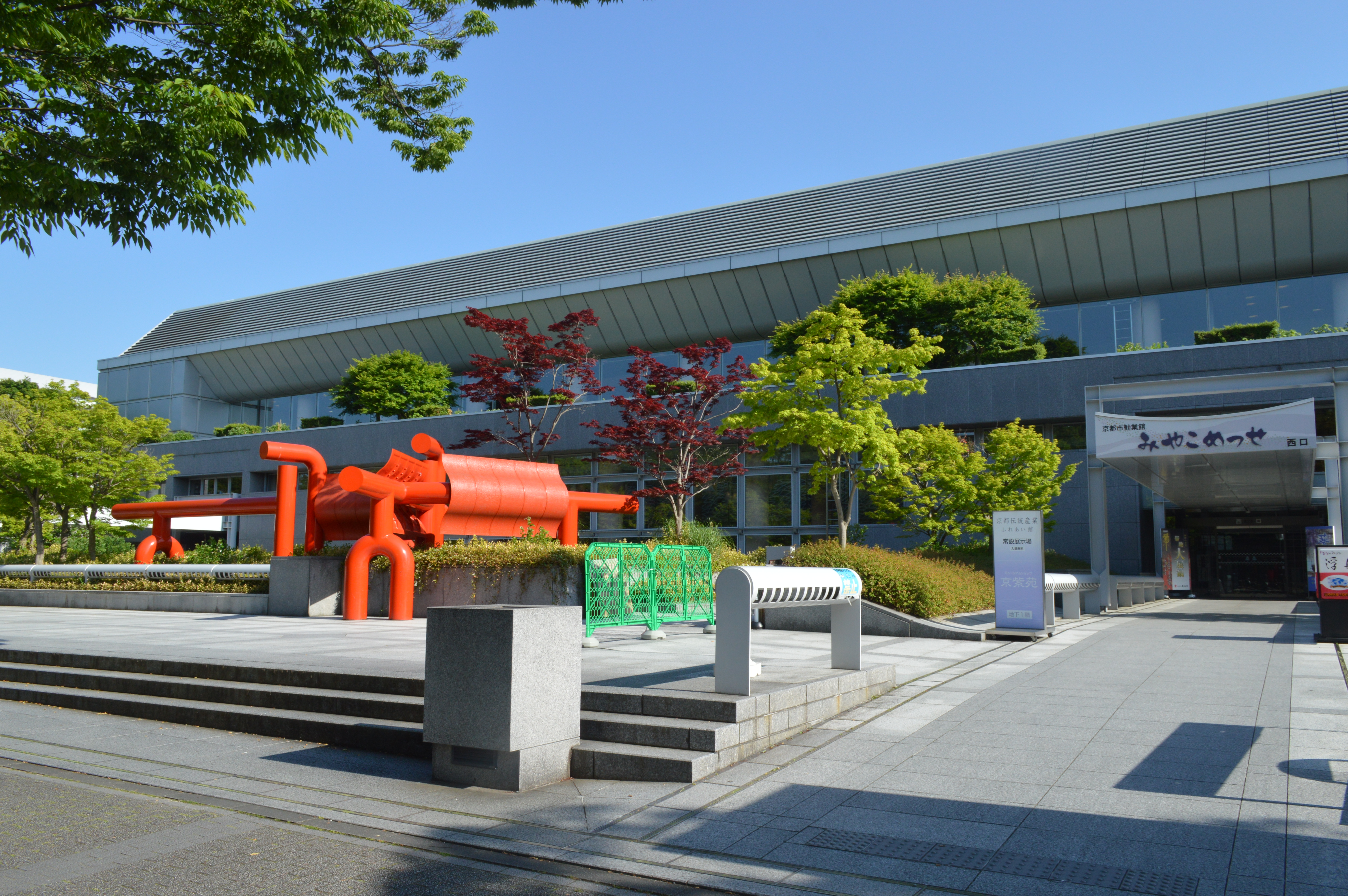 京都市勧業館（みやこめっせ）